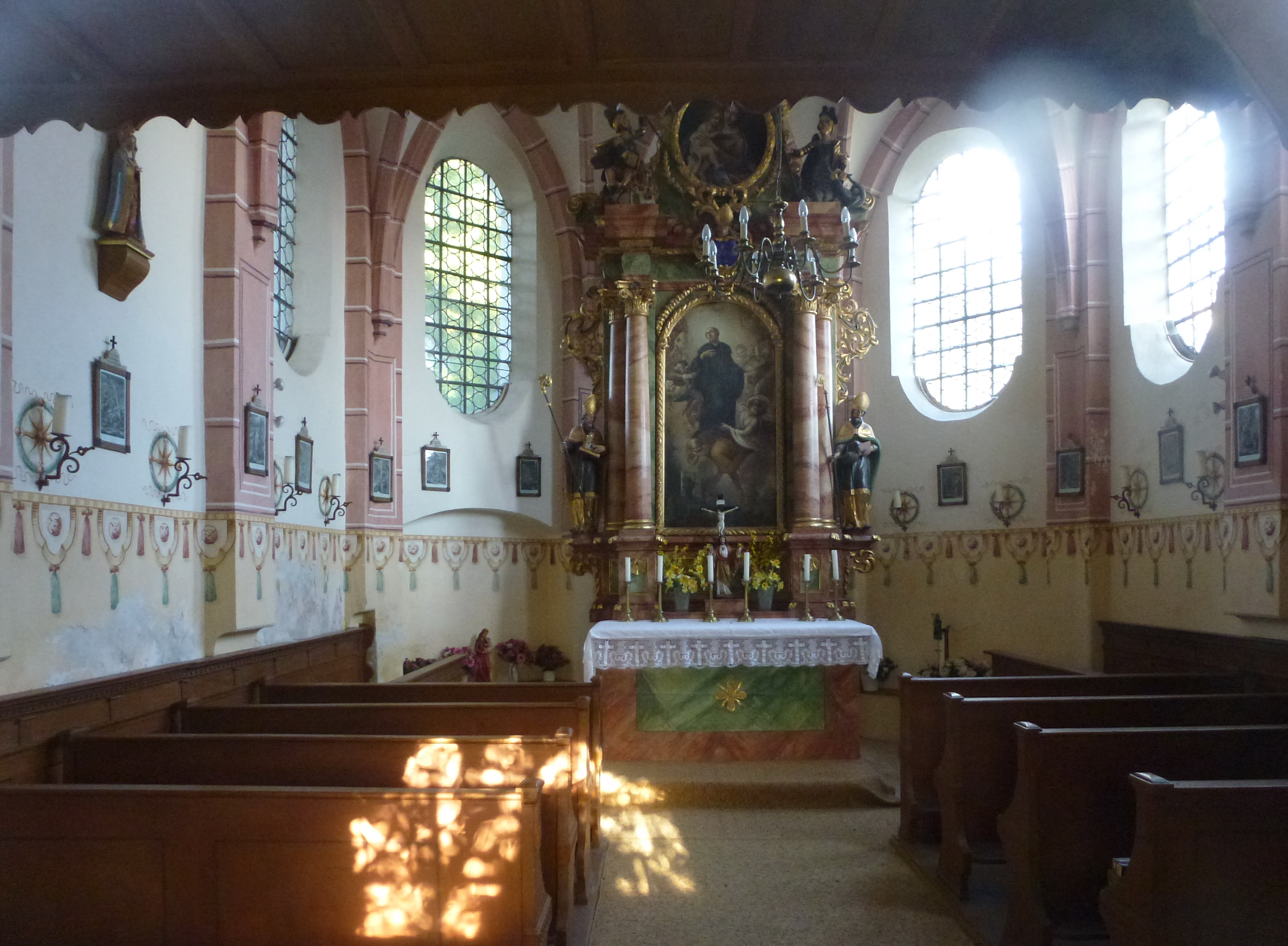 Webling (Landkreis Dachau), Webling 9: Katholische Filialkirche St. Leonhard. Blickrichtung nach Osten zum Altar